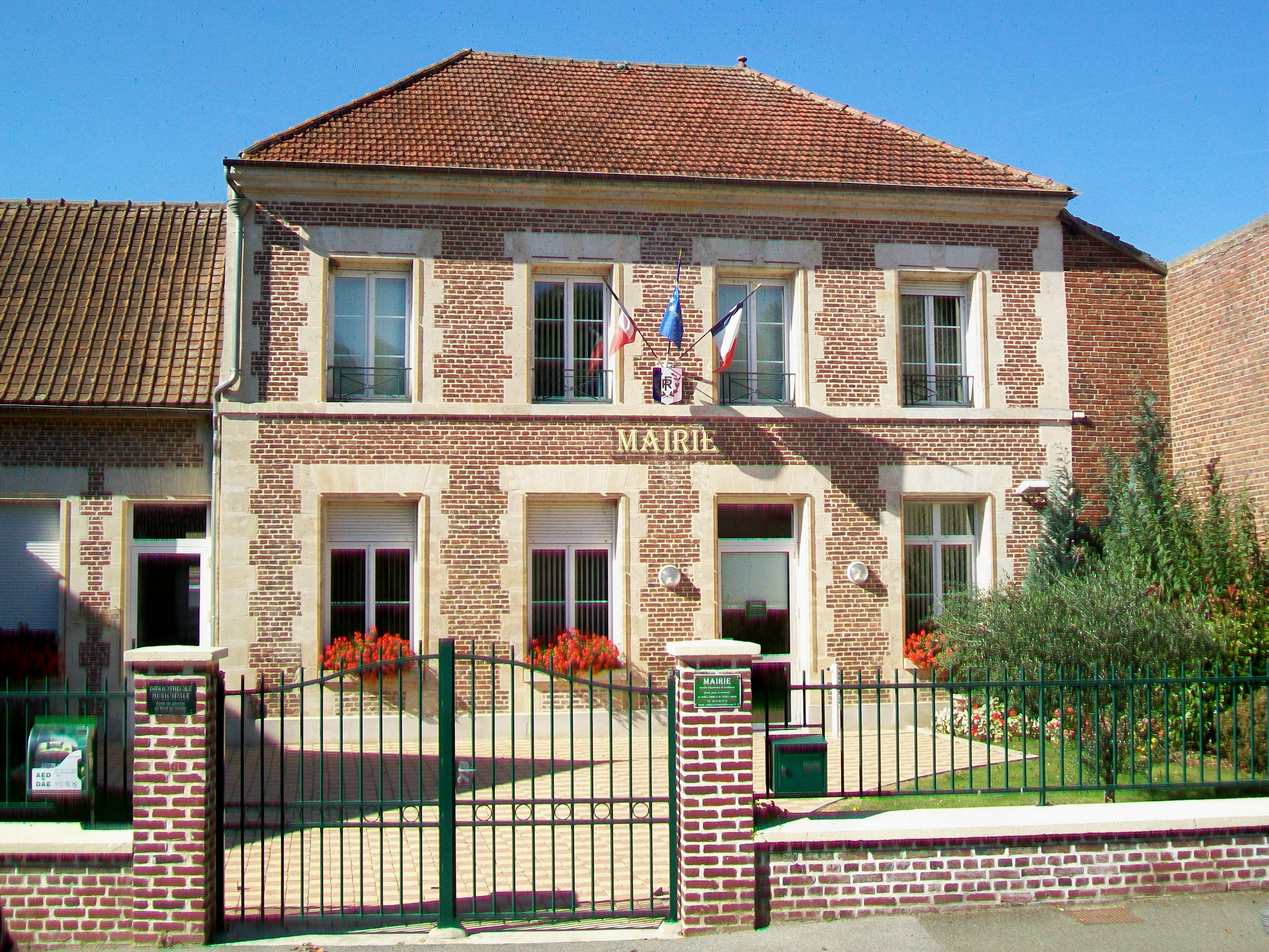 La mairie de Cany, rue des Écoles.